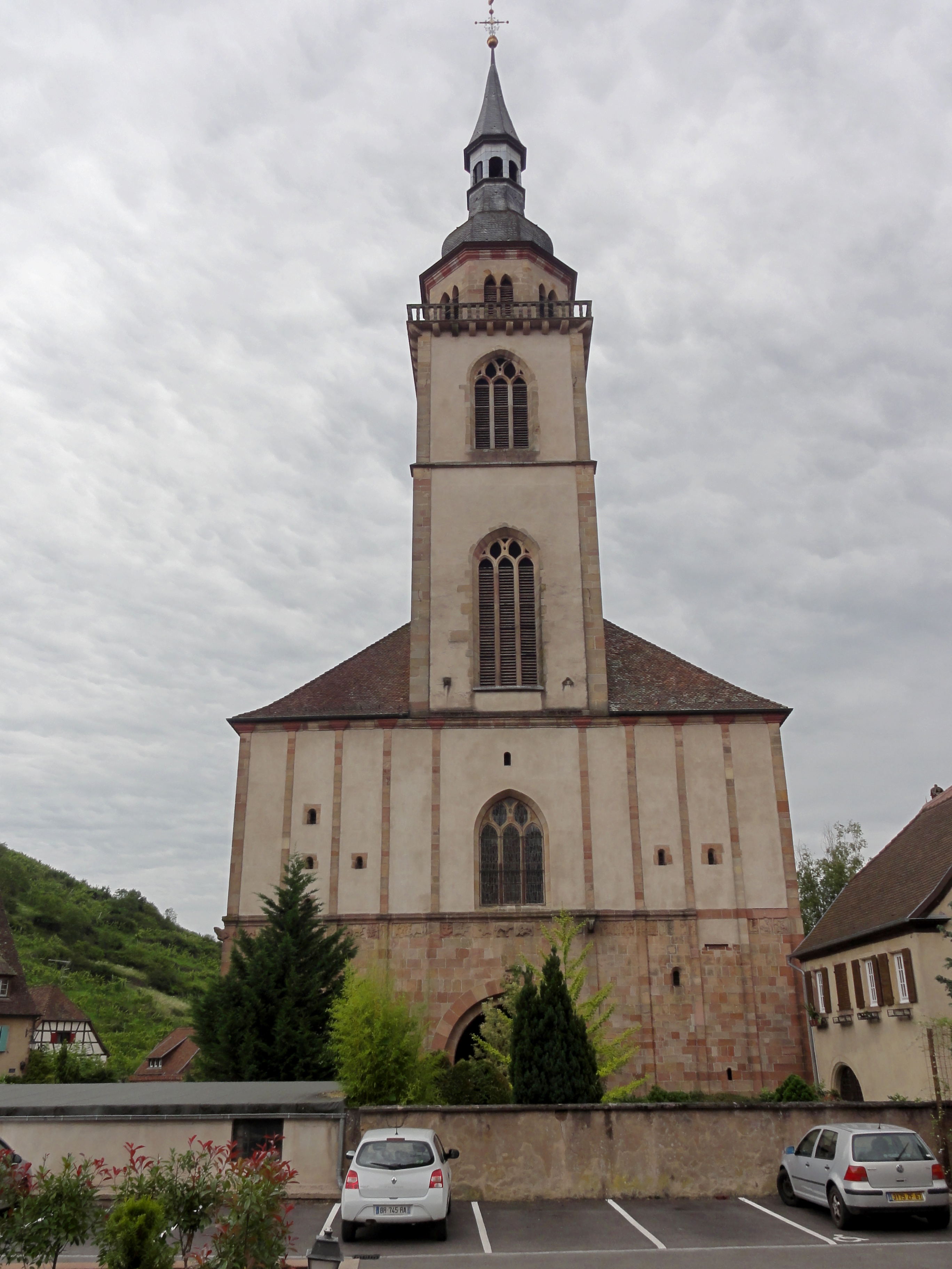 Alsace, Bas-Rhin, Andlau, Église Saints-Pierre-et-Paul dite Sainte-Richarde (PA00084587, IA00115010). Façade occidentale.